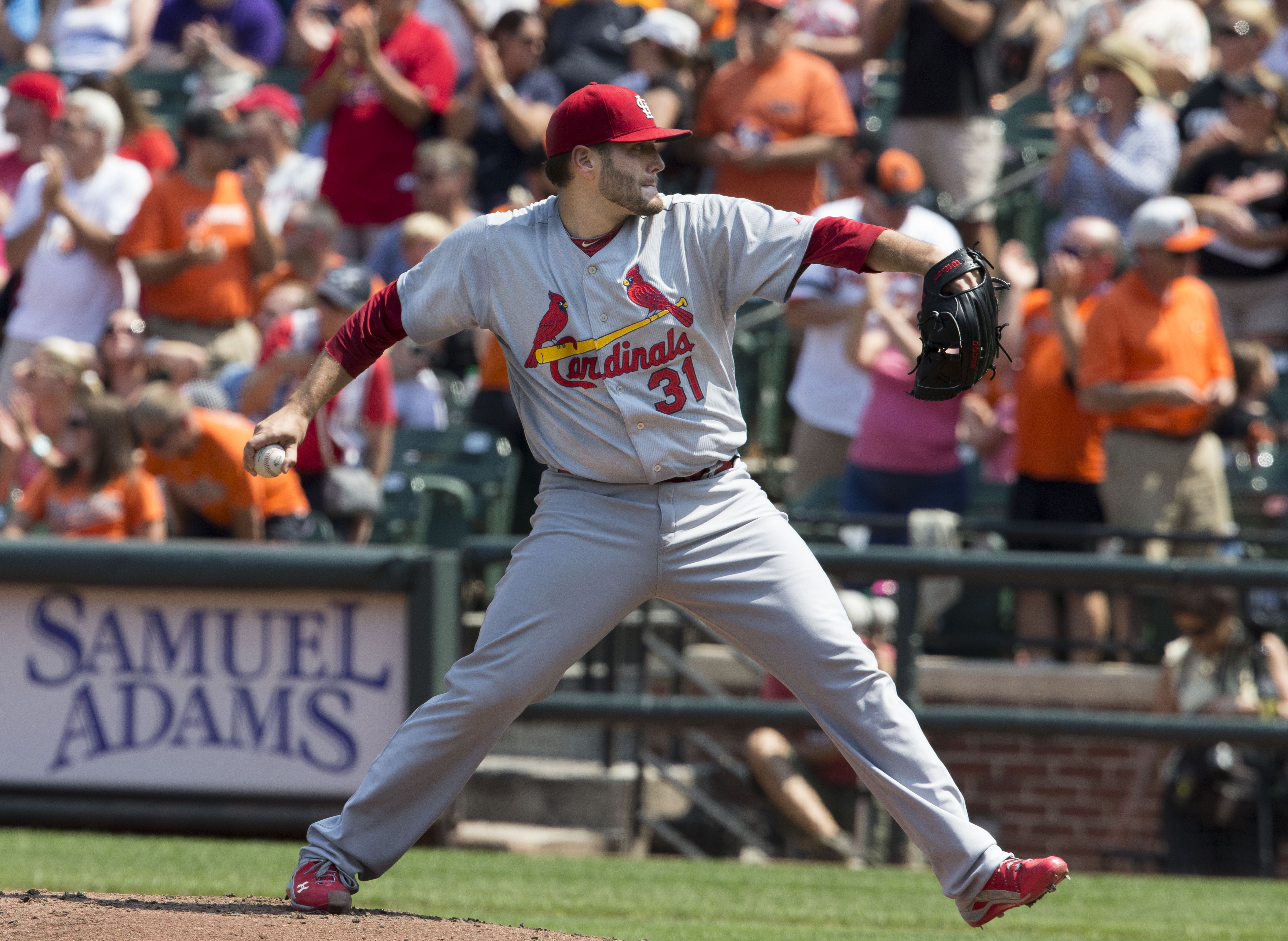 Cardinals at Orioles 8/10/14